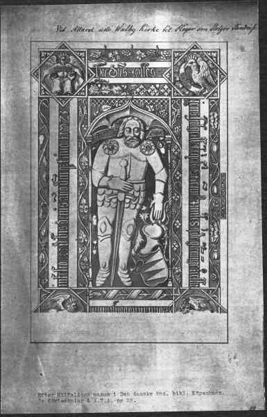 Gravsten, teckning efter Hilfelings manus i Det Kongelige Bibliotek, Köpenhamn. Kategori: (09) VapenGravsten, teckning efter Hilfelings manus i Det Kongelige Bibliotek, Köpenhamn.